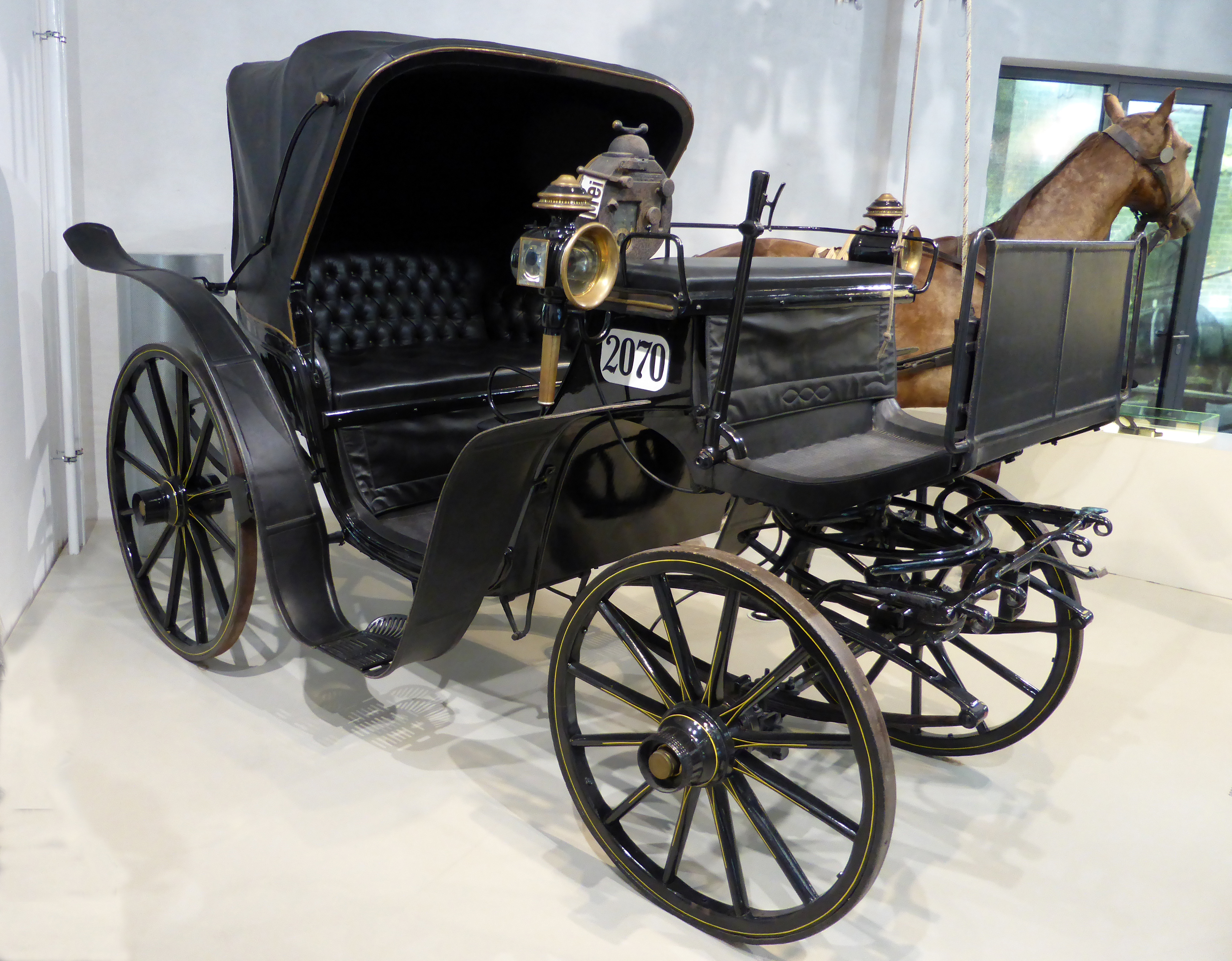 Landaulet-Kutsche, Baujahr 1898. Ausgestellt im Deutschen Technikmuseum in Berlin. Wikipedianische KulTour am 10. Oktober 2015 in der Ausstellung des Museums.